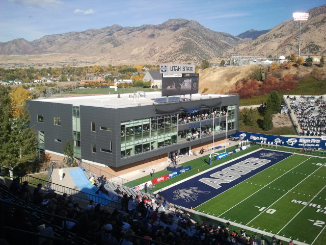 Complexe académique sportif du stade Maverik des Aggies d'Utah State